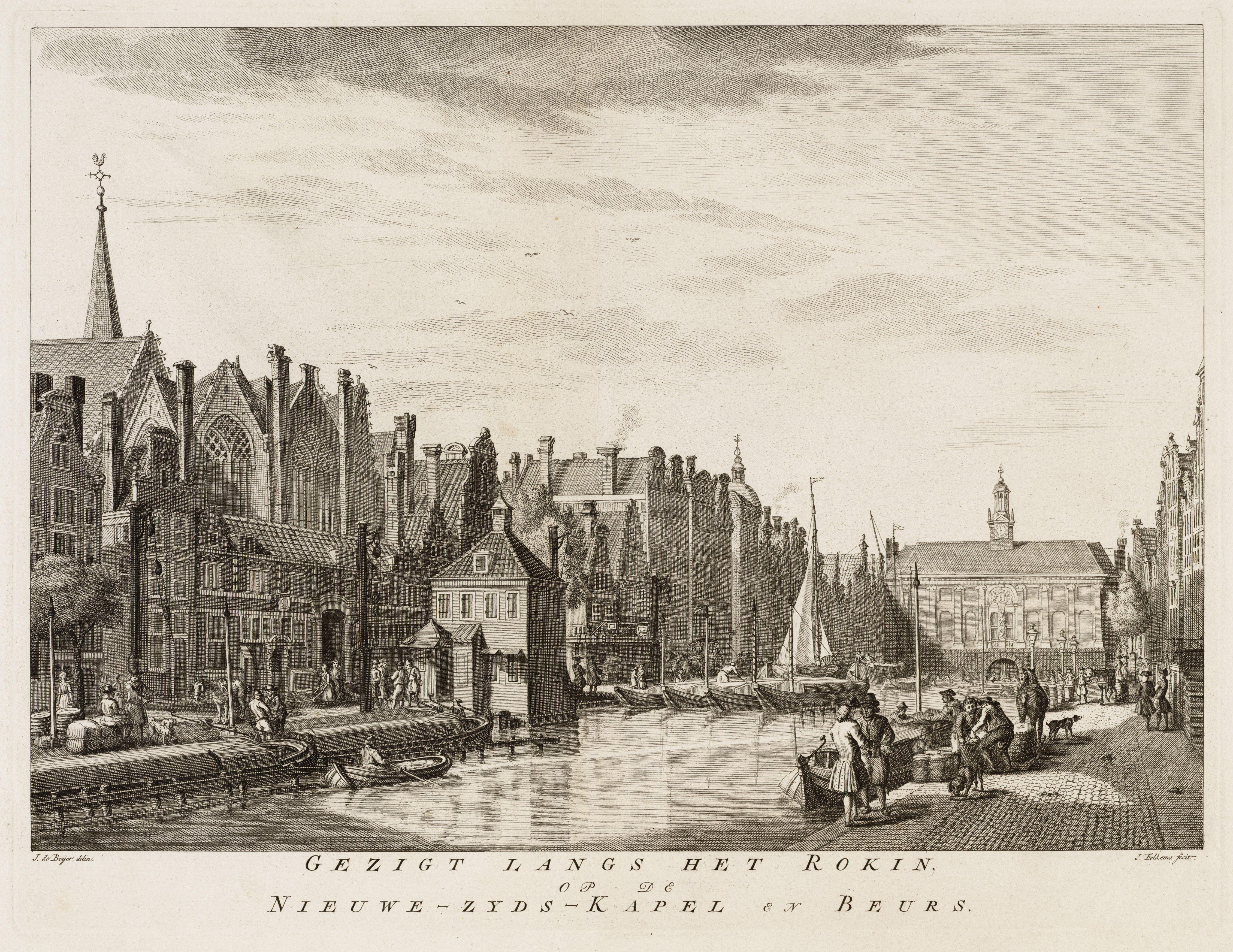 Beschrijving Gezigt langs het Rokin, op de Nieuwe-Zyds-Kapel en Beurs Gezicht langs het Rokin in noordelijke richting naar de Beurs van Hendrick de Keyser. Links de Nieuwezijds Kapel en het Rotterdammerveer. Afmetingen: 260 x 365 mm Documenttype prent Vervaardiger Folkema, J. (etser, graveur) Beijer, Jan de (1703-1780) Collectie Collectie Atlas Dreesmann Geografische naam Rokin Inventarissen Afbeeldingsbestand 010094003470